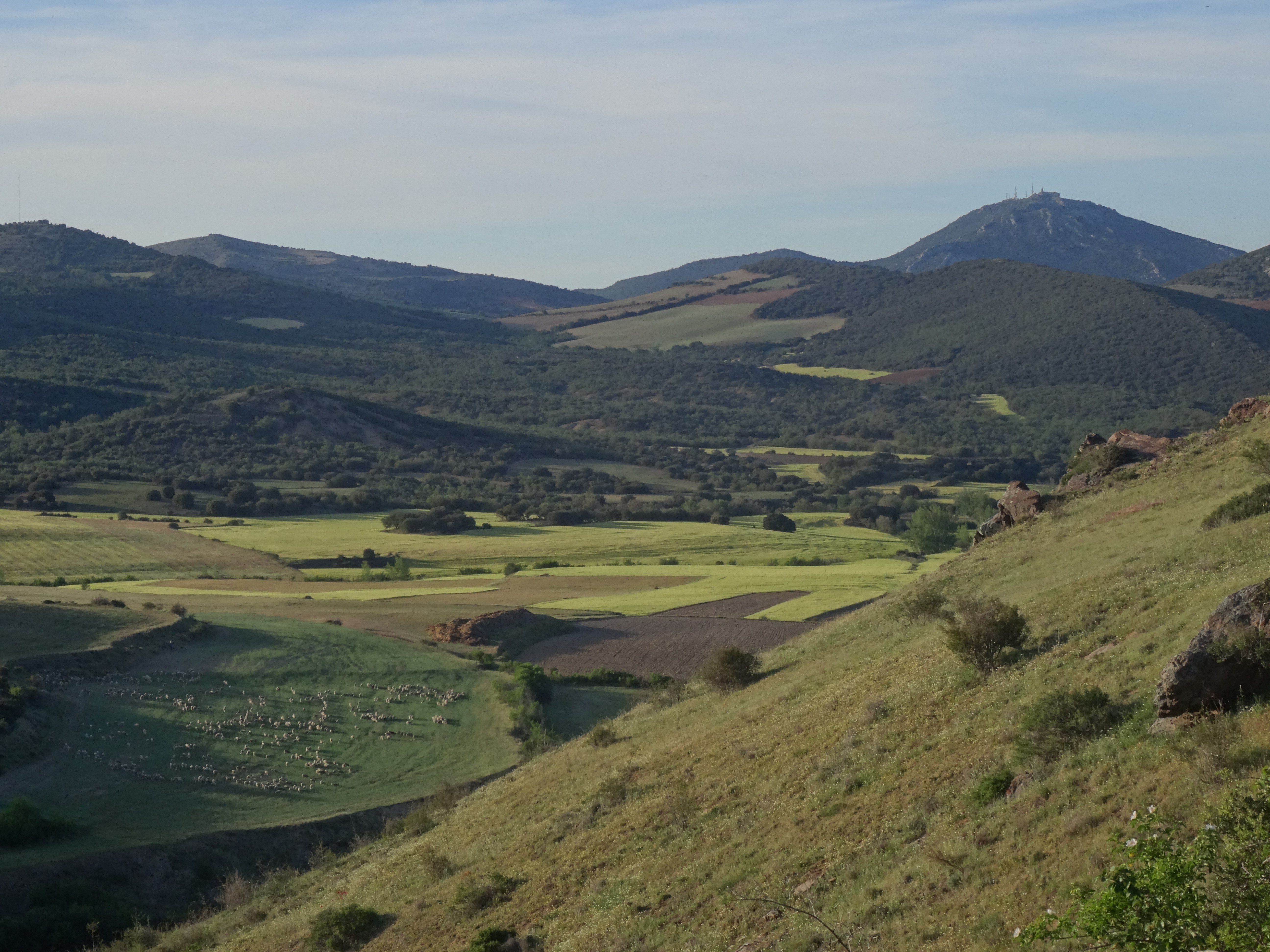 Vistas desde Bádenas con rebaño de ovejas